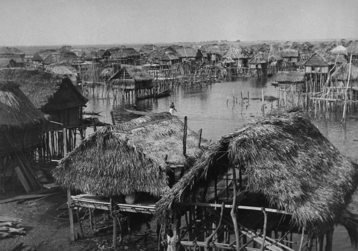 Ganvié is midden in een zoutwatermeer gebouwd en ligt aan de zuidkust van Benin. Het paalwoningendorp werd gebouwd als reactie op de aanvallen van Fon krijgers op naburige gemeenschappen in de 16e eeuw. De Dan-Homey koning probeerde via de slavenhandel zijn rijkdom te vergroten en liet zijn krijgers het achterland uitkammen op zoek naar slaven. Water vormde echter een serieus obstakel voor de krijgers, zij waren gebonden aan traditionele wetten waarin het betreden van water 'taboe' was. Vluchtelingen besloten daarop hen voortaan uit de weg te gaan door een dorp midden in de lagune te bouwen, en met succes. Zo ontstond het volk van de Tofinu, 'mensen gedragen door het water'. De bescherming van het water heeft er toe bijgedragen dat de bevolking tegenwoordig enkele tienduizenden zielen telt. In het dorp wordt alles via het water gedaan. Er zijn nauwelijks bruggen en kleine bootjes ('pirogues') varen af en aan tussen de huizen.